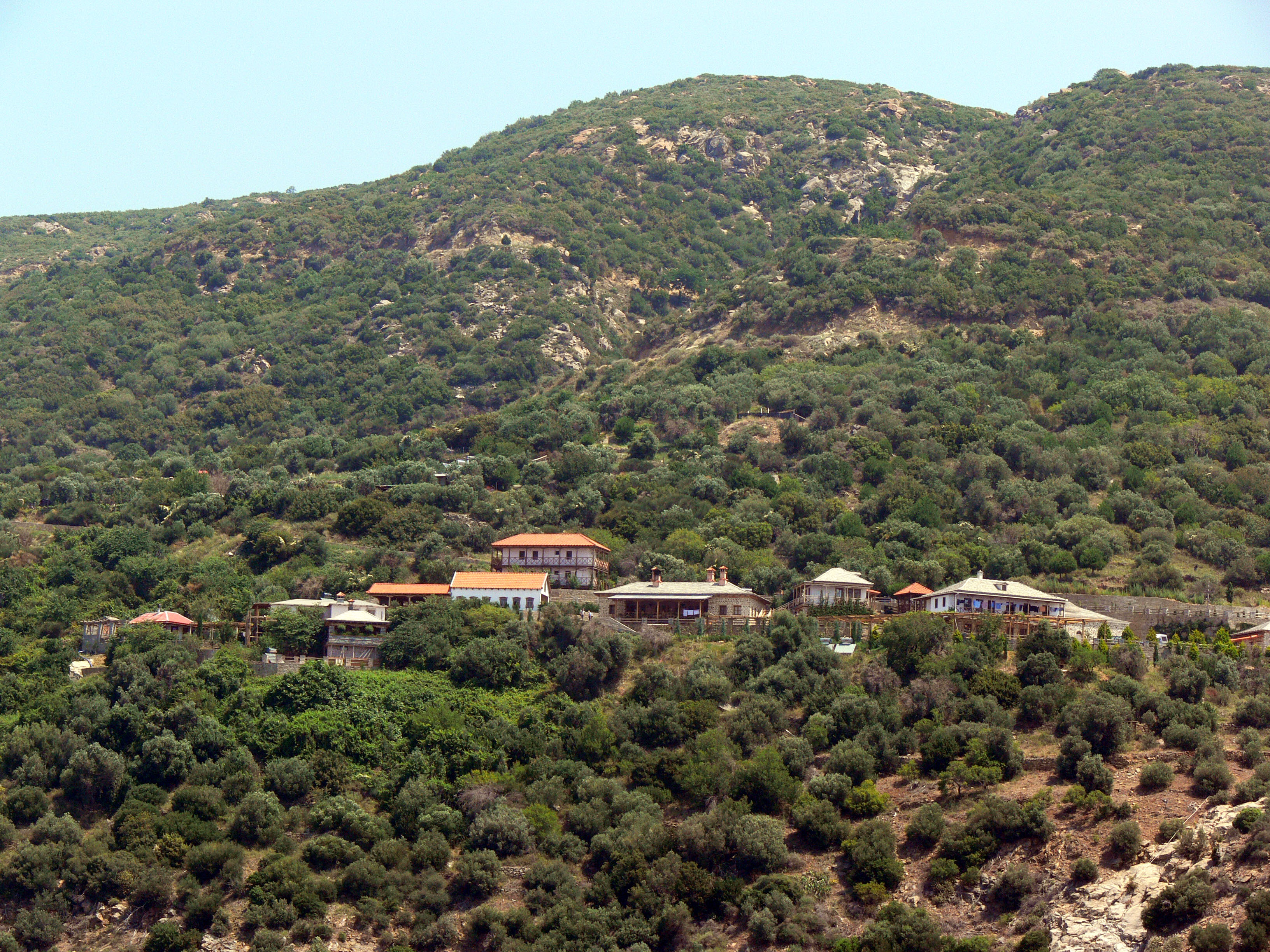 Kloster Modestos